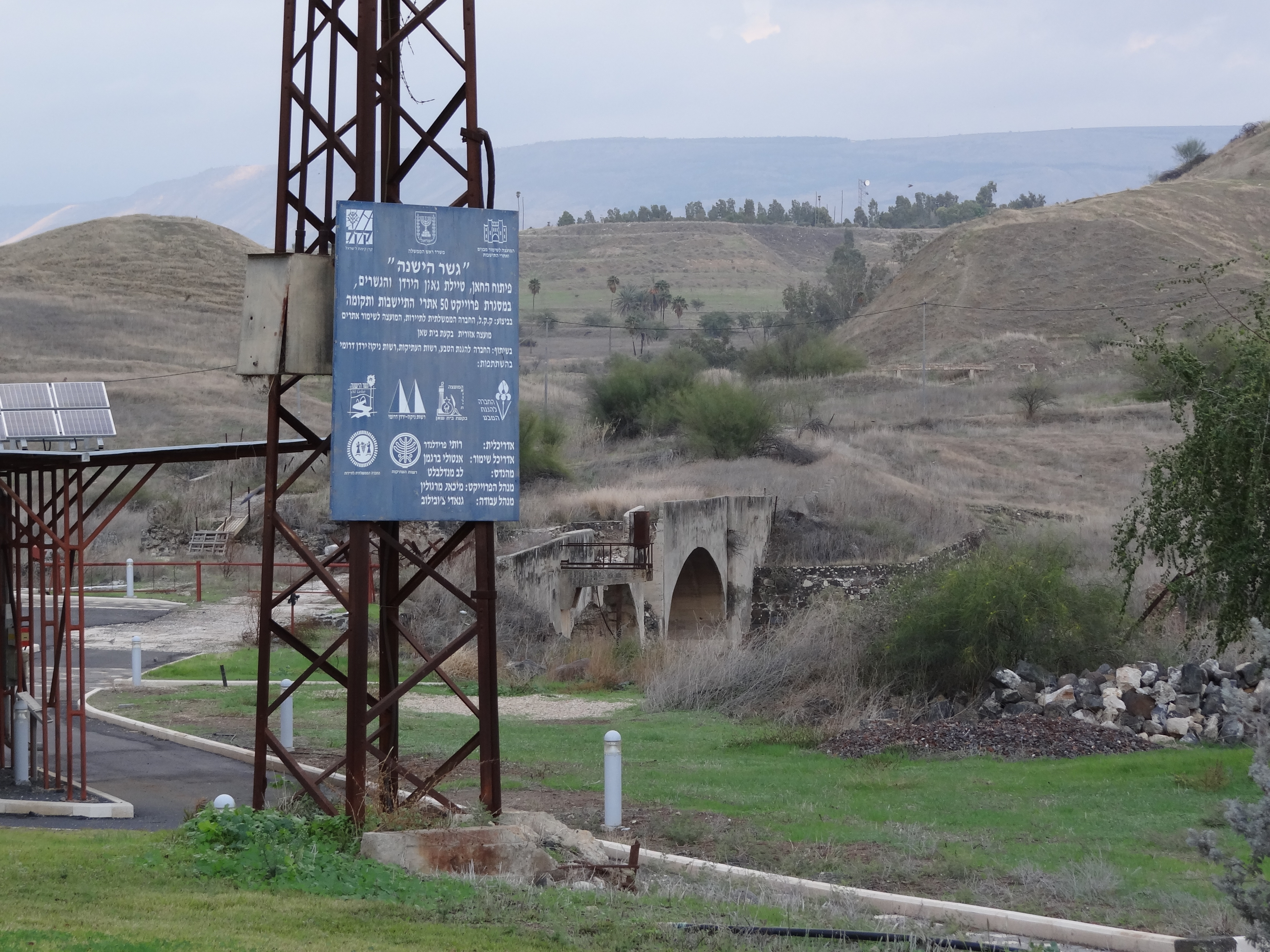 Old Gesher. In 1939 a kibbutz settle in the area. It called Gesher. The member of the kibbutz defended this palce and the police station in 1948 חצר גשר הישנה. במקום הייתה התיישבות בשנות העשרים של המאה העשרים. המתיישבים הקימו בשנת 1936 את קיבוץ אשדות יעקב. בשנת 1939 התיישבה קבוצה שהקימה את קיבות גשר. היא הגנה על המקום במלחמת העצמאות. היישוב הותקף על ידי בצבא העירקי נהרס אבל לא נכבש.